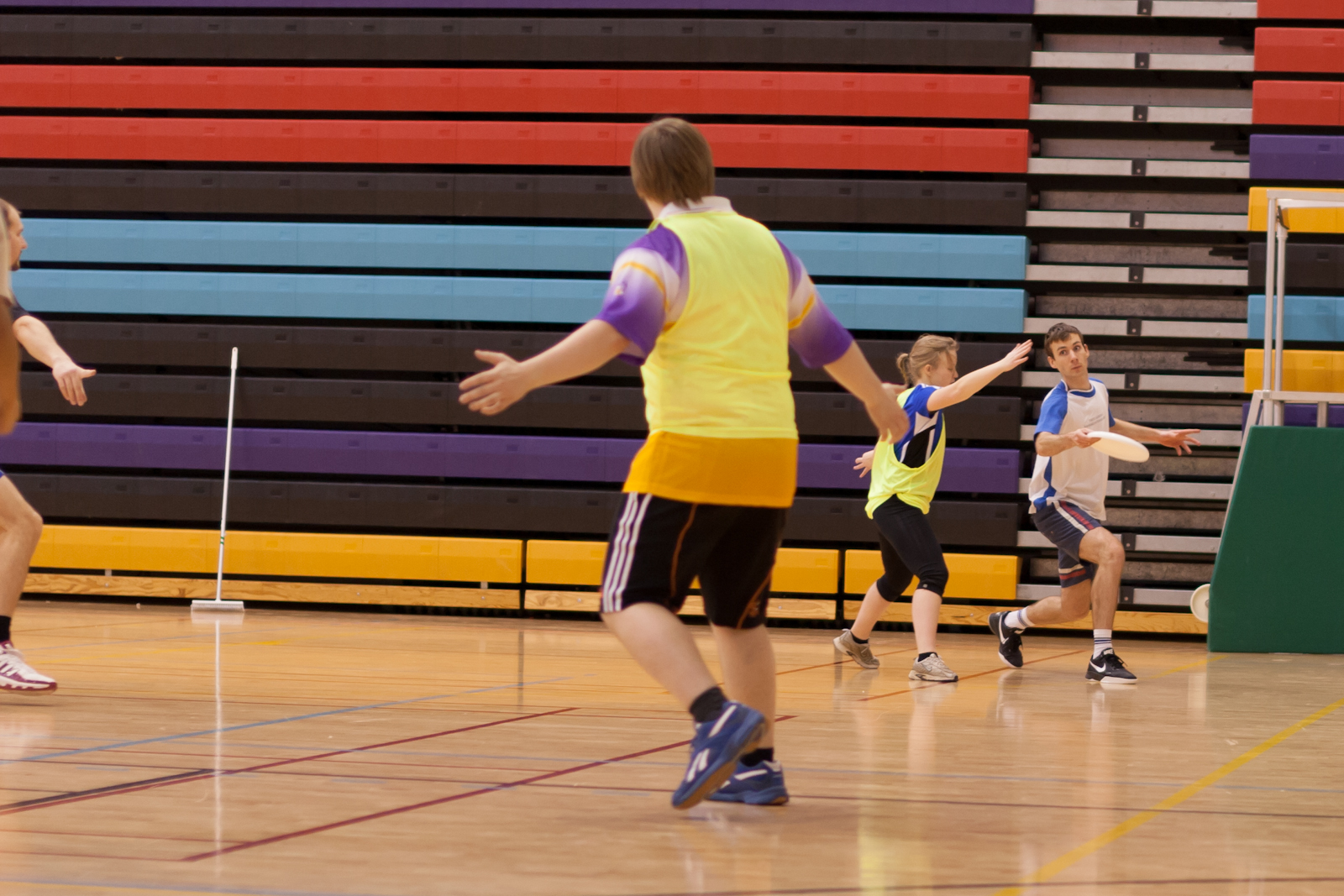 Tartu frisbeeklubi. A. le Coqi spordihoone Tartus.